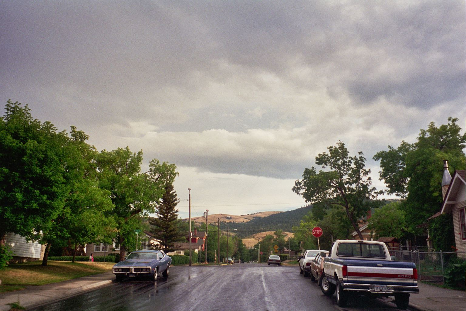 Residential area in Helena, Montana, USA